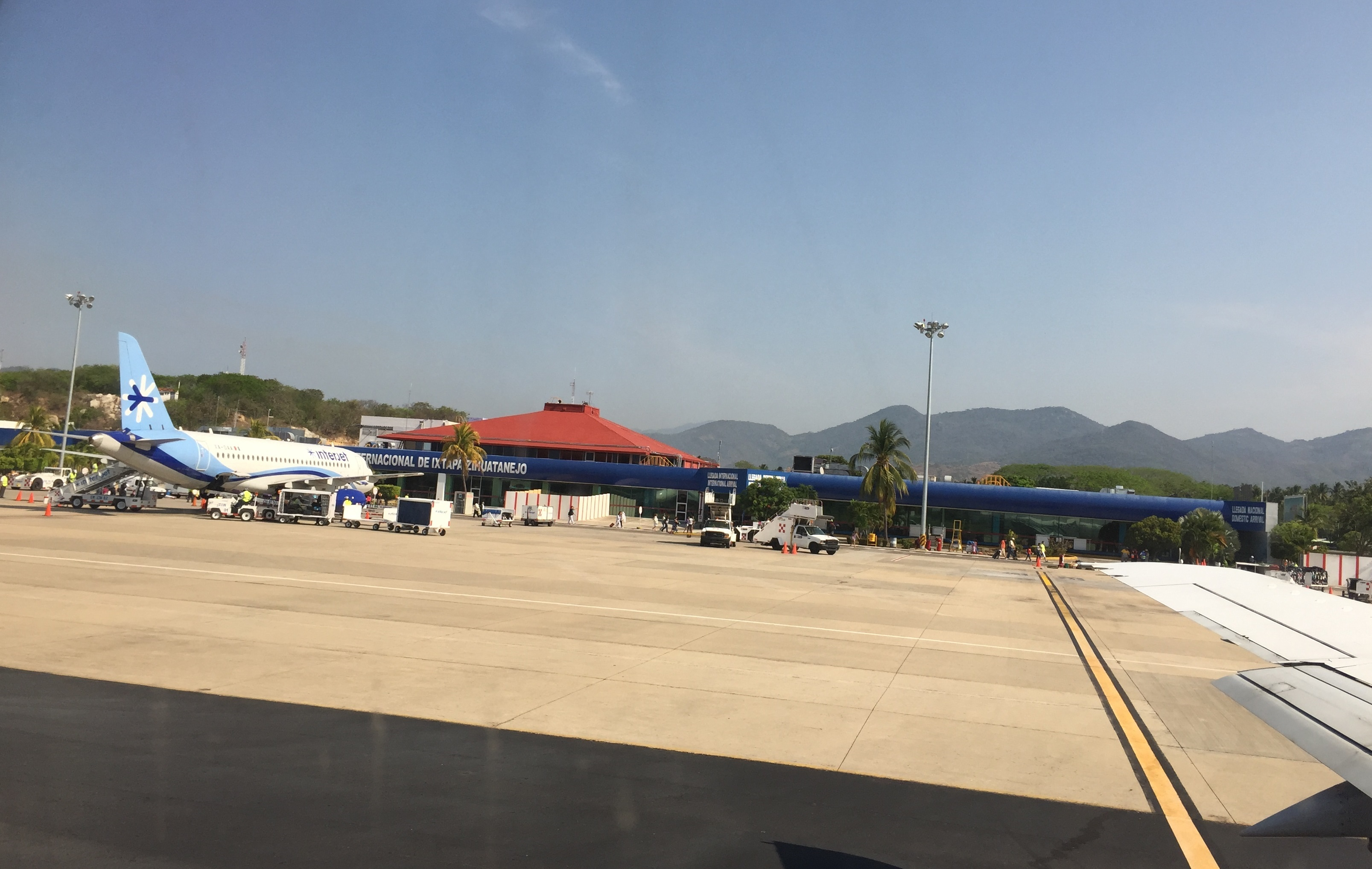 Avión de Interjet en el Aeropuerto de Ixtapa-Zihuatanejo.